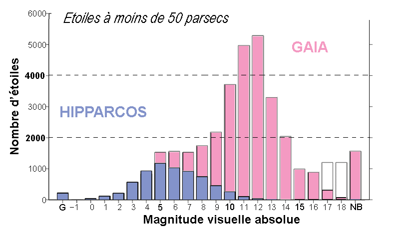 Comparaison du nombre d'étoiles à moins de 50 parsecs du Soleil détectées par Gaia (en rose) comparé au résultat d'Hipparcos. Le nombre d'étoiles est ventilé par magnitude absolue. A l'extreme gauche les géantes rouges (G) et à l'extreme droite les naines blanches (NB). Seules quelques étoiles de magnitude 17 et 18 ne seront pas détectées par Gaia.